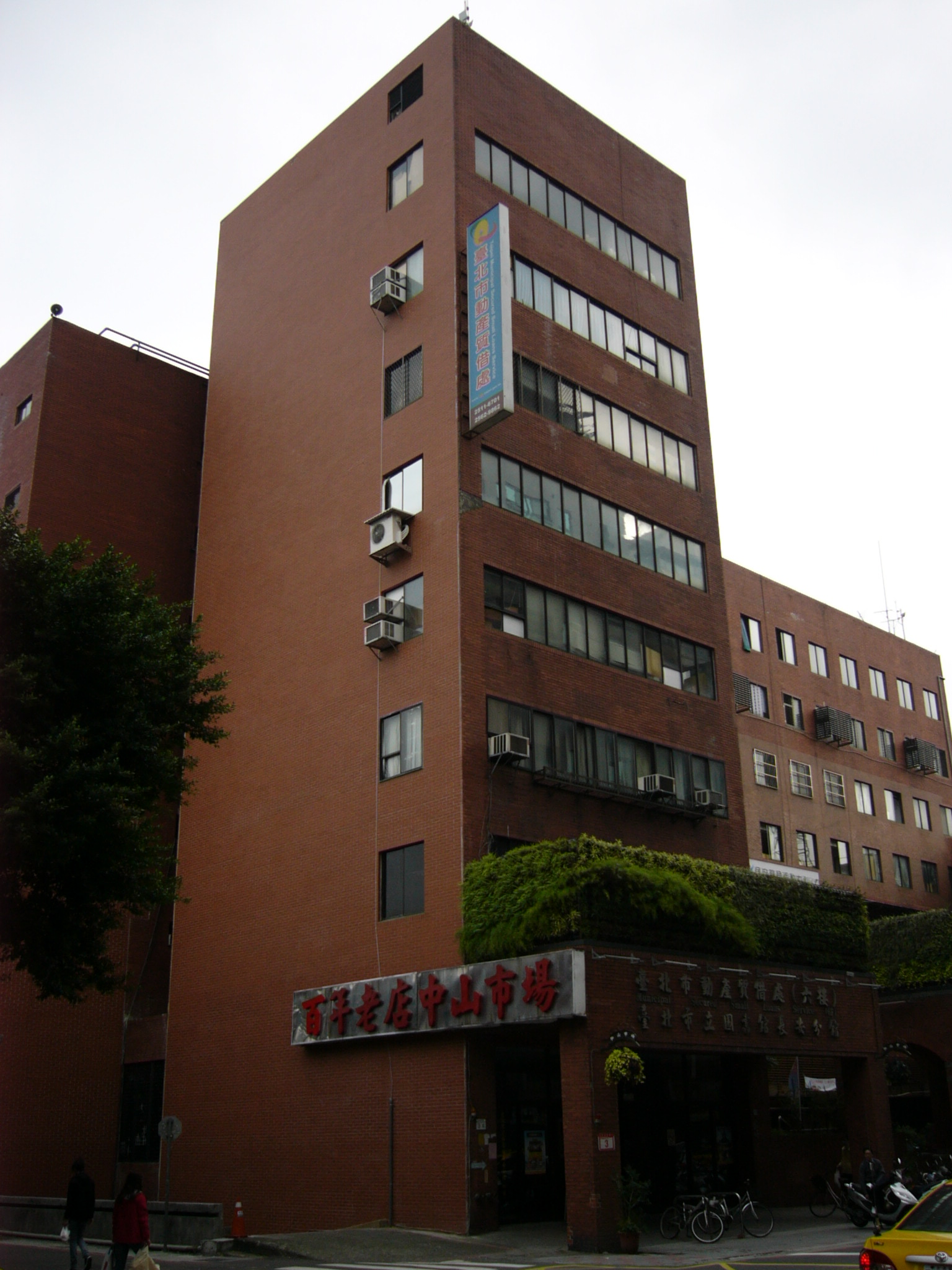 臺北市中山市場，位於臺北市中山區長安西路3號，臺北市立圖書館長安分館在四樓，臺北市動產質借處總處在六樓。